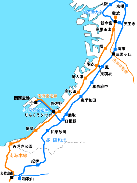 大阪 - 和歌山間で競合する鉄道の路線図